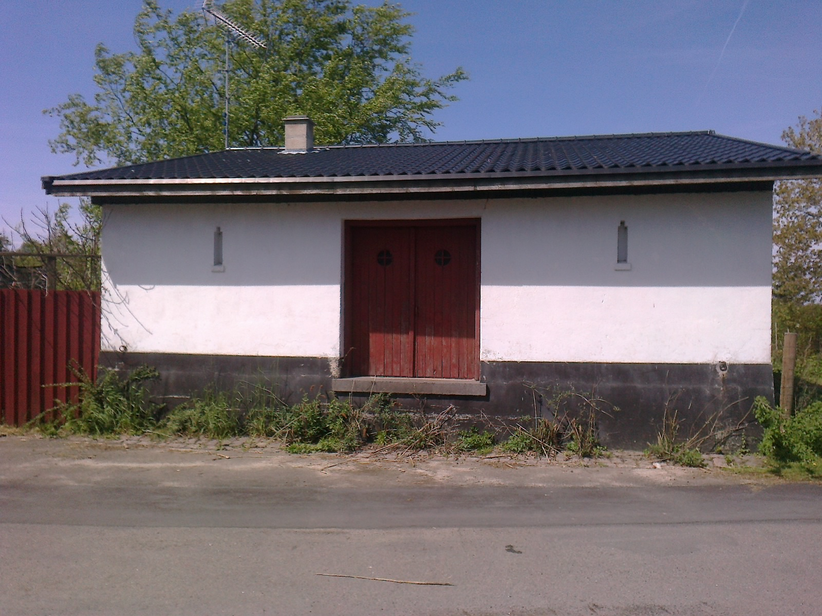 Pakhuset ved Nyker Station